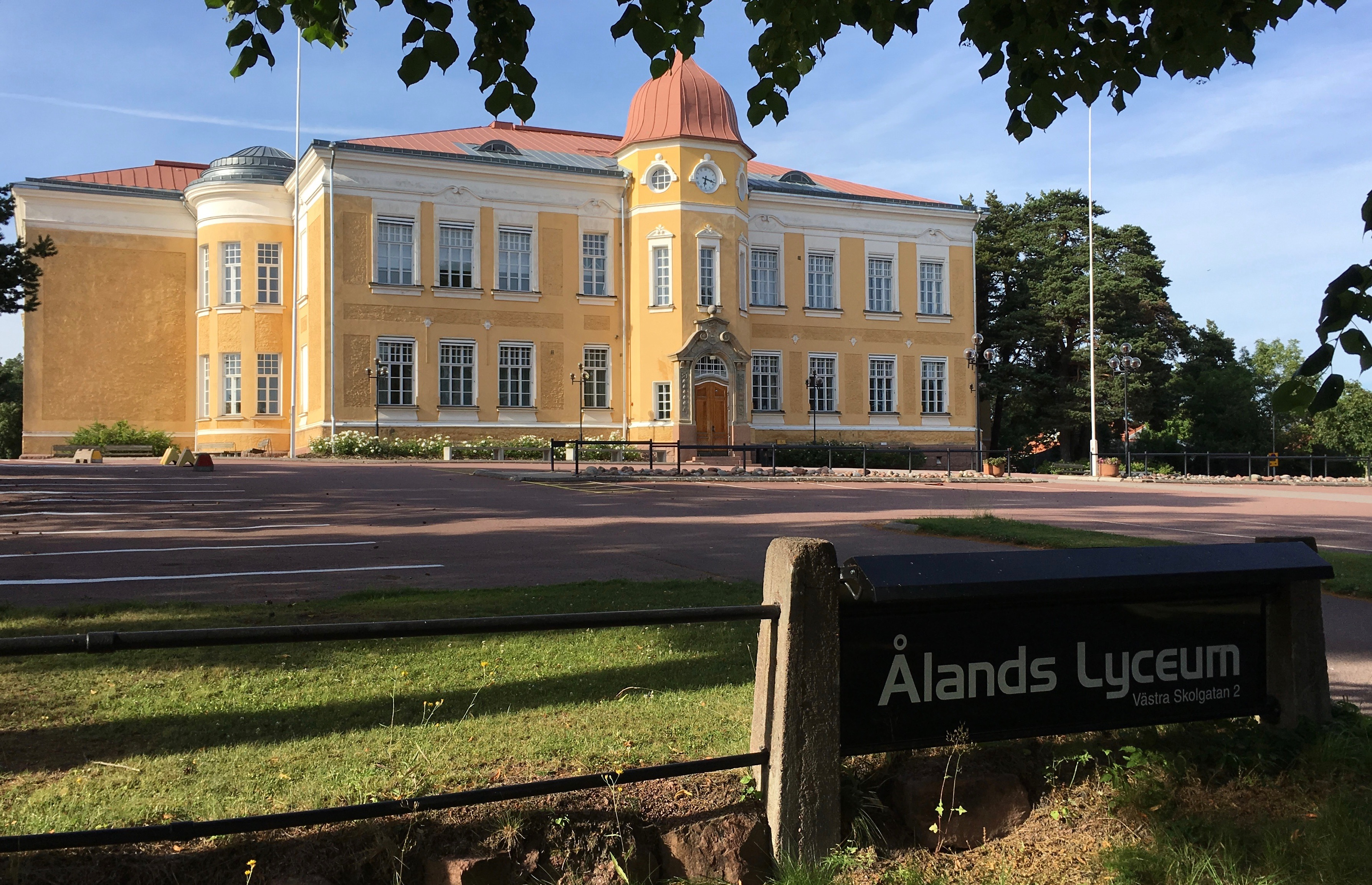 Alands Lyceum Maarianhaminassa, arkkitehti Jacob Ahrenberg, 1903.